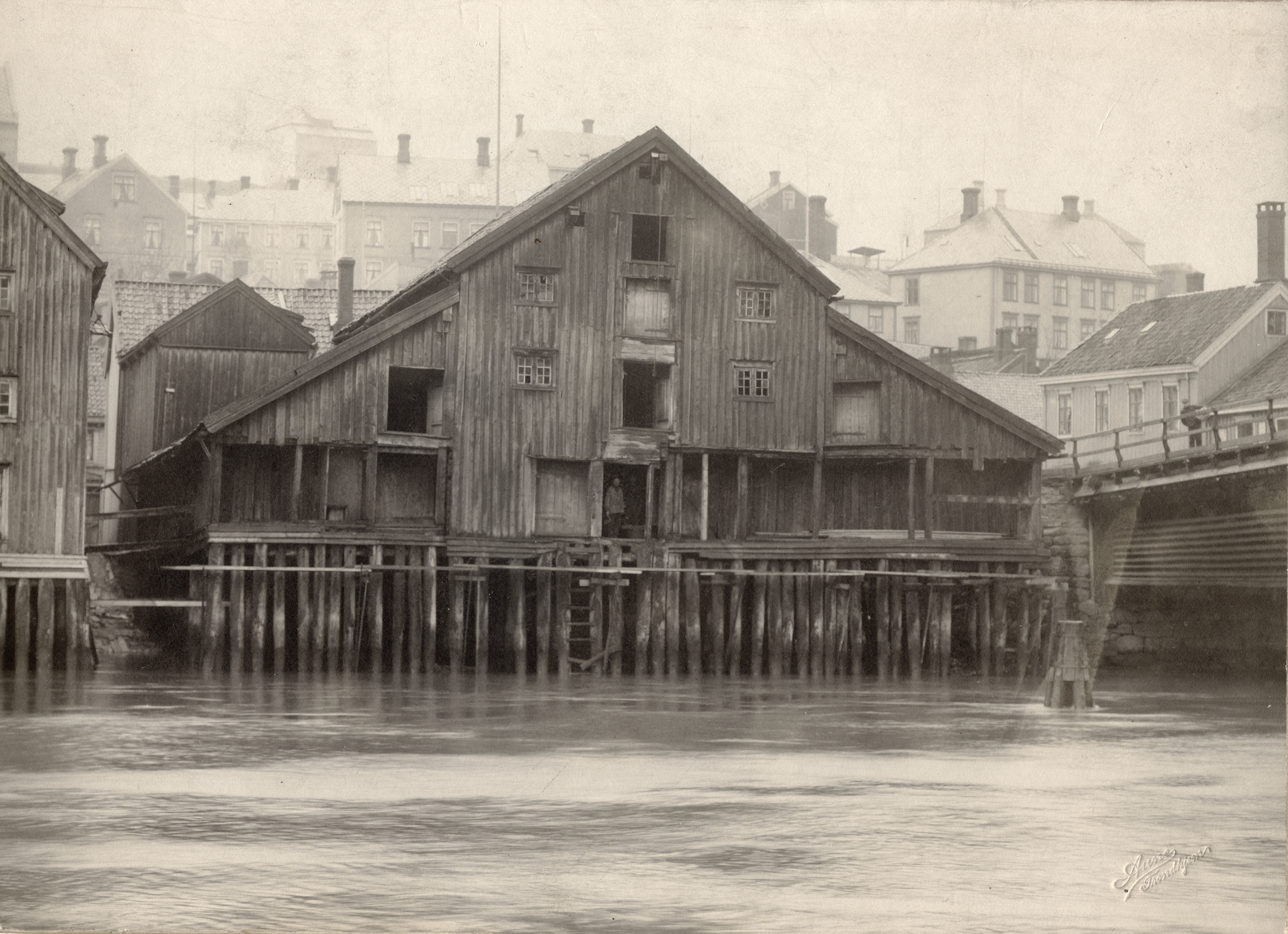 Sjøbod i Trondheim, Sør-Trøndelag This image on crowdsourcing geotagging platform Fotodugnad